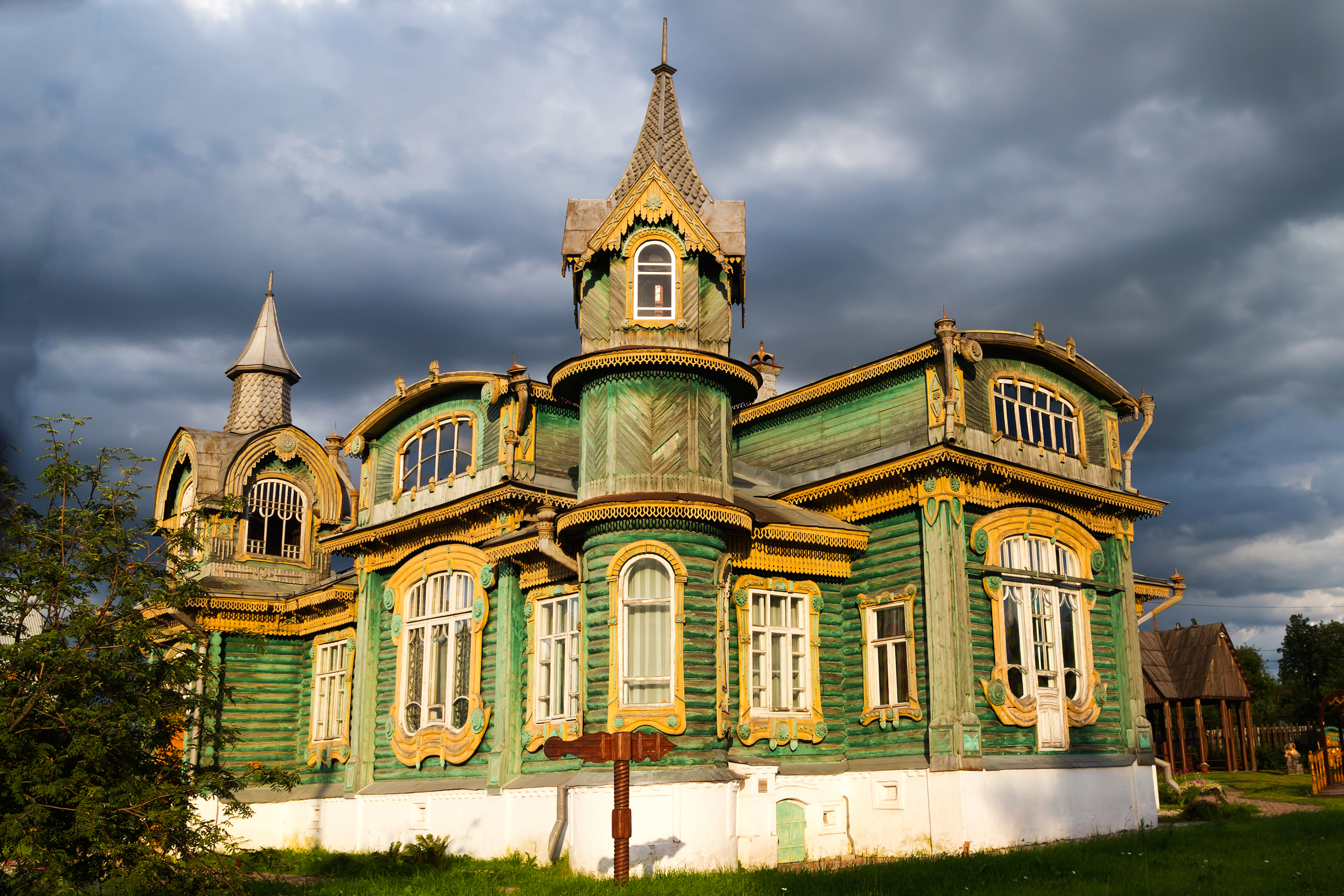 особняк Шорина: улица Московская, 45, Гороховец, Гороховецкий район, Владимирская область